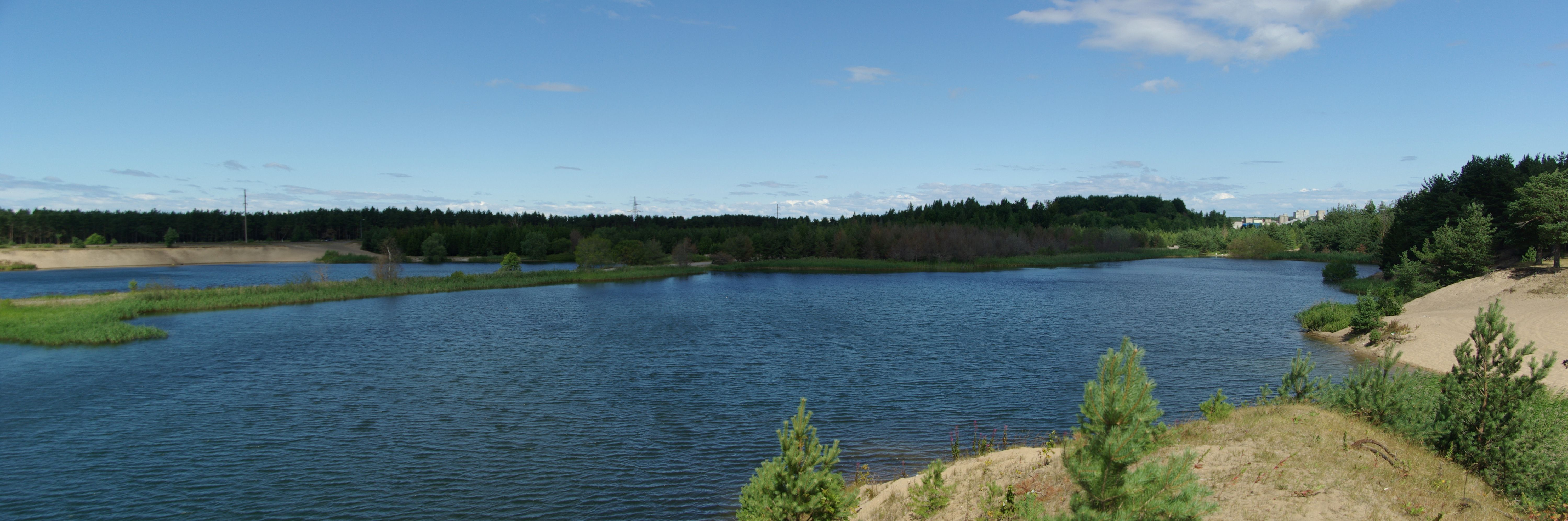 on looduslik järv Harjumaal,Tallinna linna Nõmme linnaosas